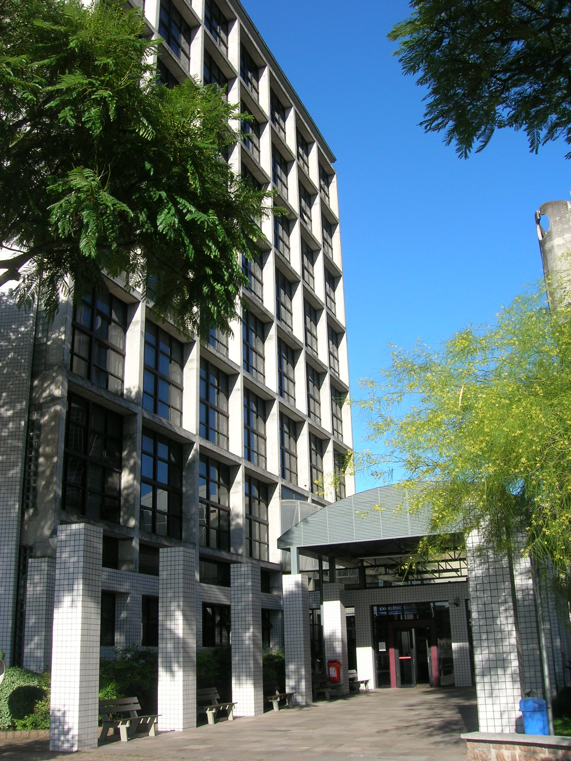 O prédio 12 da PUCRS.